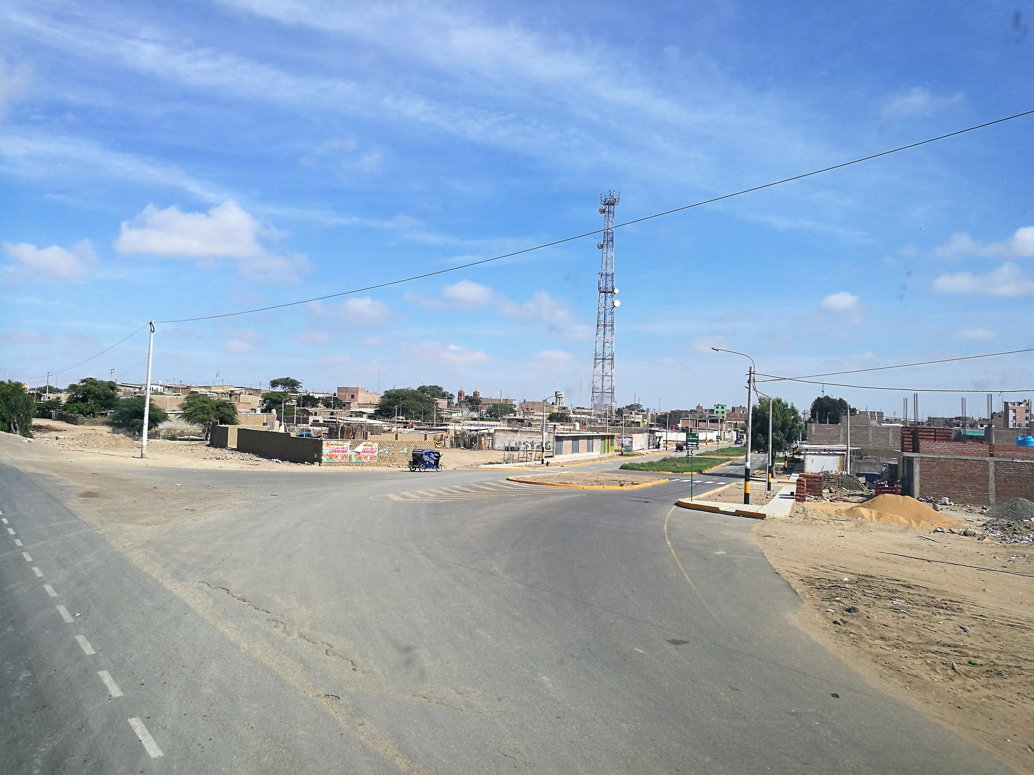 Morrope des de la Panamericana Norte (1N)